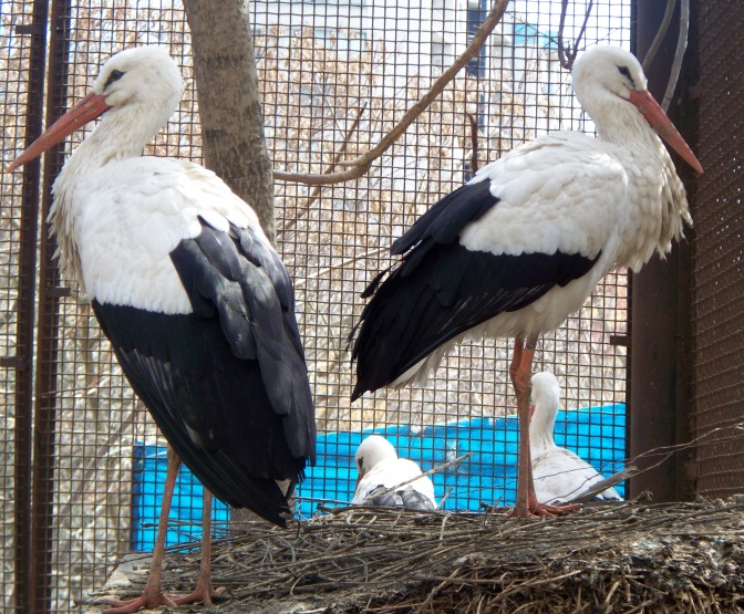 аисты в бакинском зоопарке